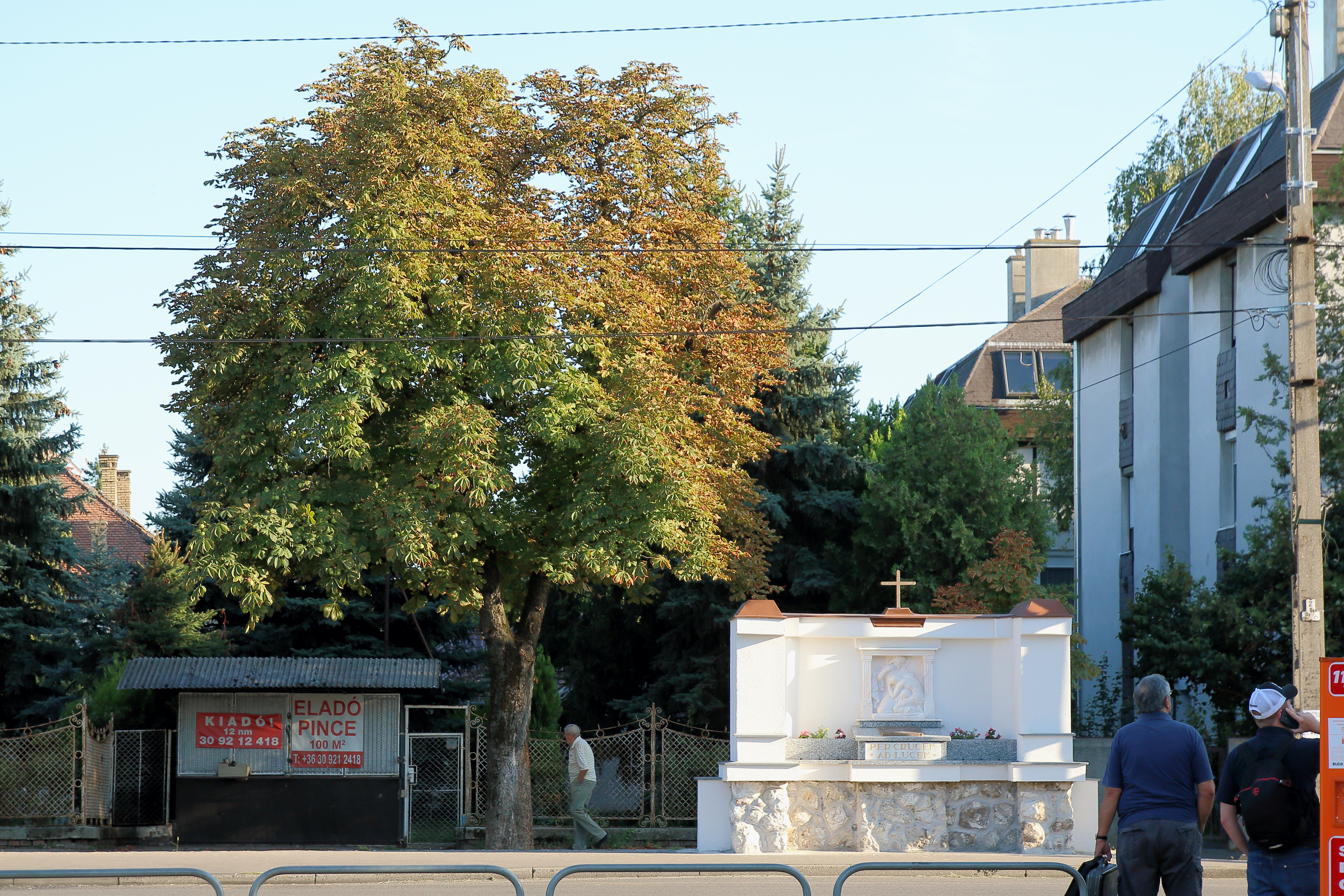 A Király Miklós emlék, 2019-es felújítását követően - „Az emlékmű örök időkön át hirdetni fogja azok dicső emlékét, akik fiatal életükkel pecsételték meg rajongásukat a motorkerékpársport iránt.“ írta a Nemzeti Sport, 1926. augusztus 29-én.Baranyi Károly alkotása